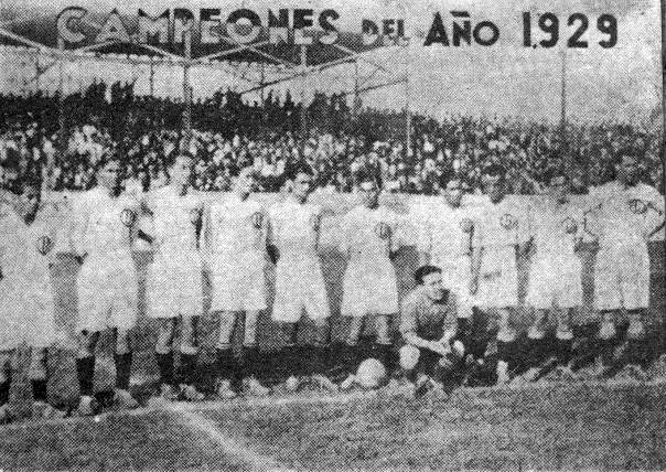 Primer equipo campeón de Universitario de Deportes